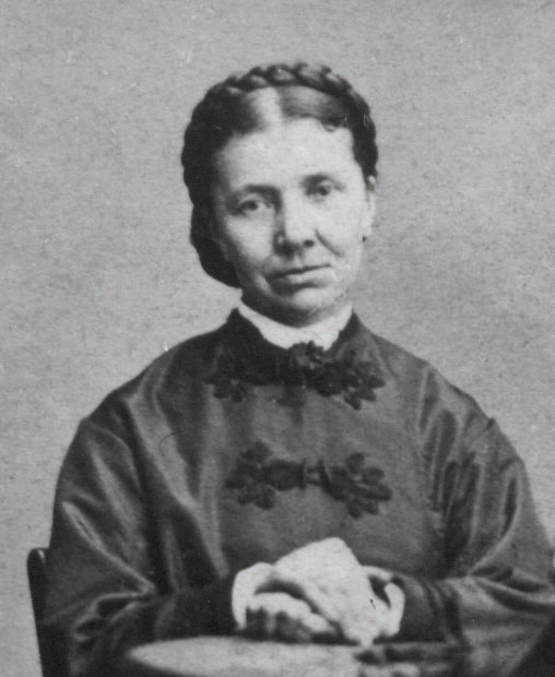 Anna Bové (1829-1886).